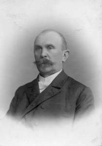 Jan Jaroslav Jindáček (1846 - 1927), Rakouský a český podnikatel a politik.